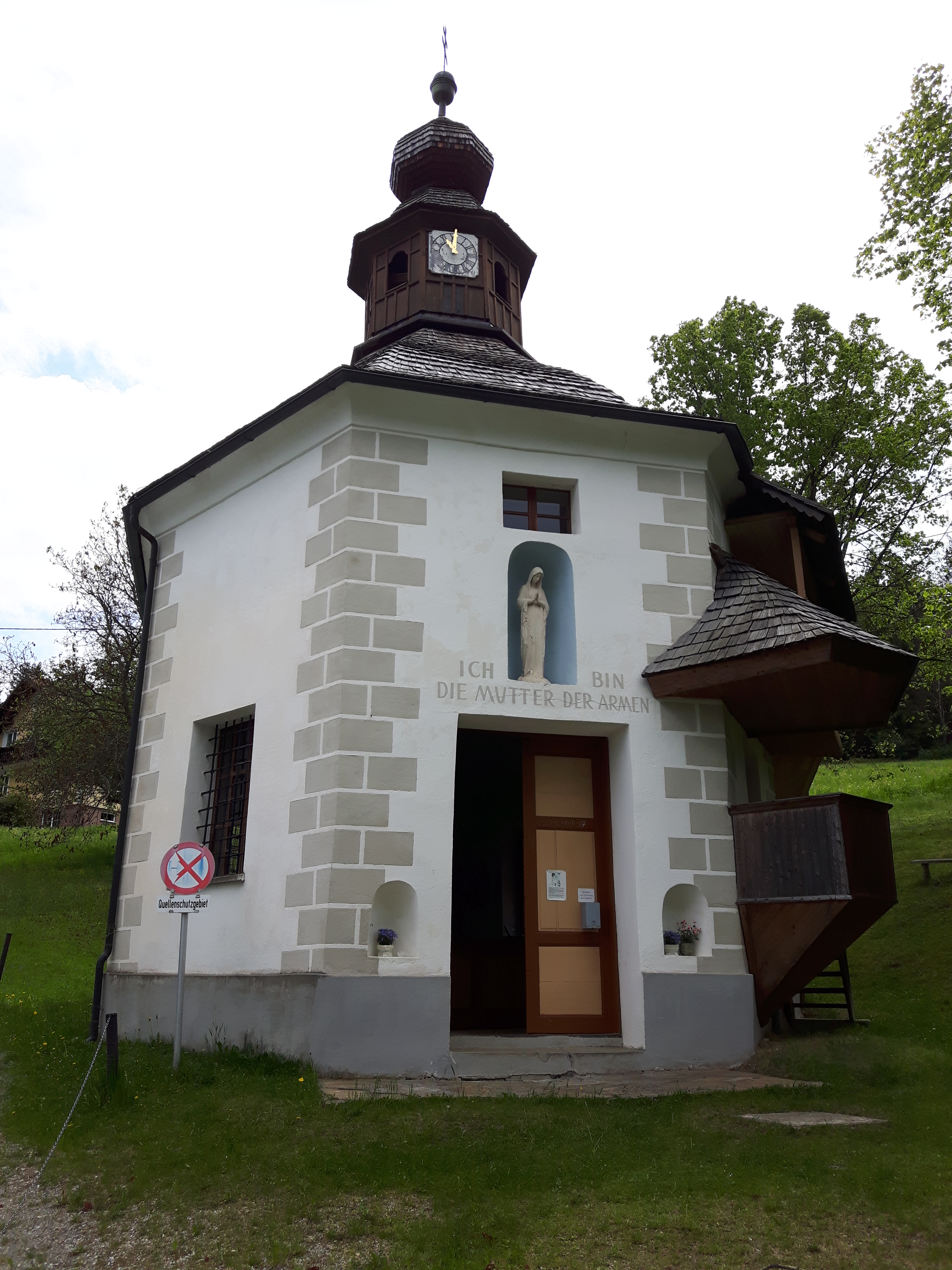 Wallfahrtskirche hl. Ulrich (Ulrichsbrunn)